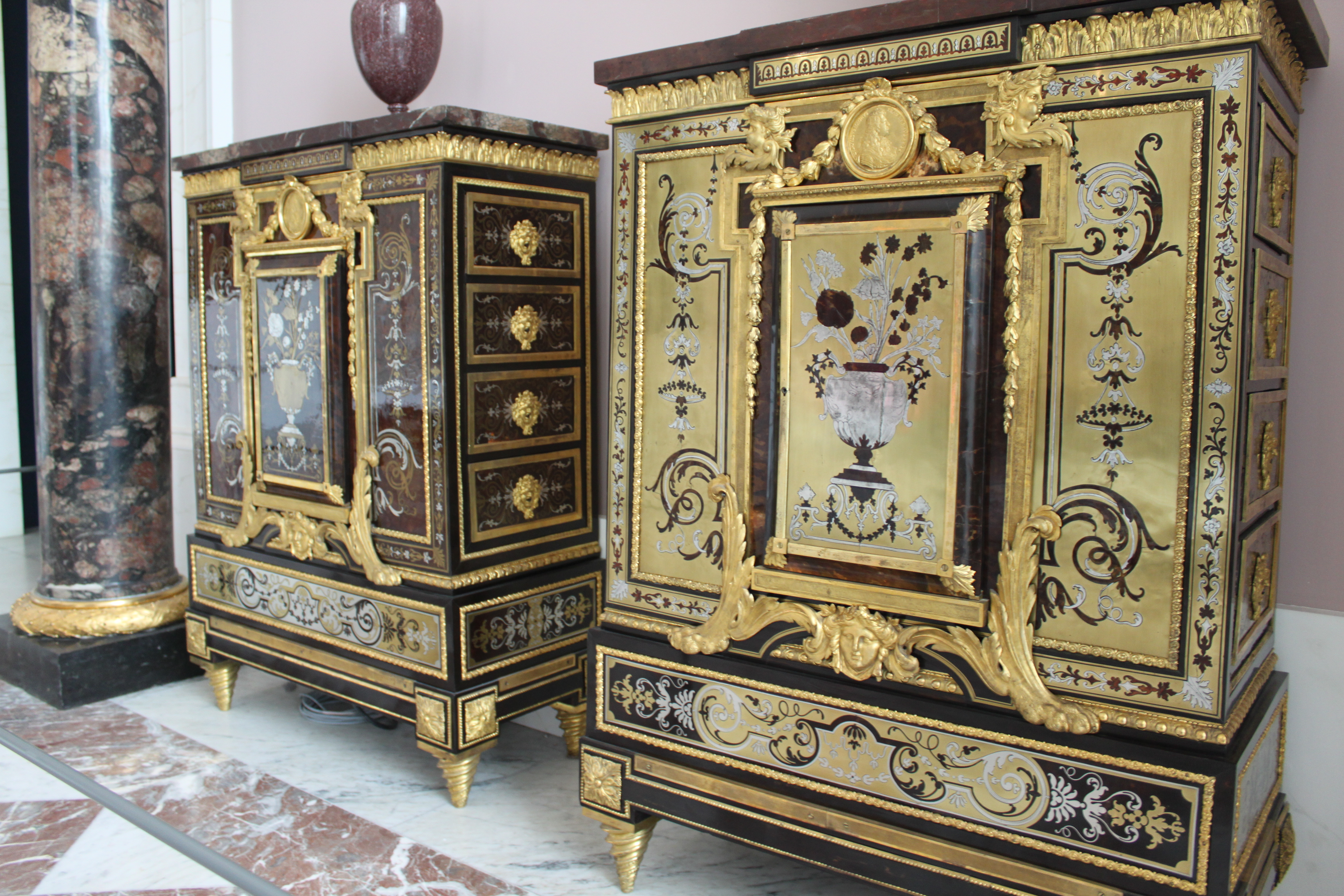 Paire de cabinets bas - Paris - vers 1770 - Levasseur - Louvre - OA 5453-5454